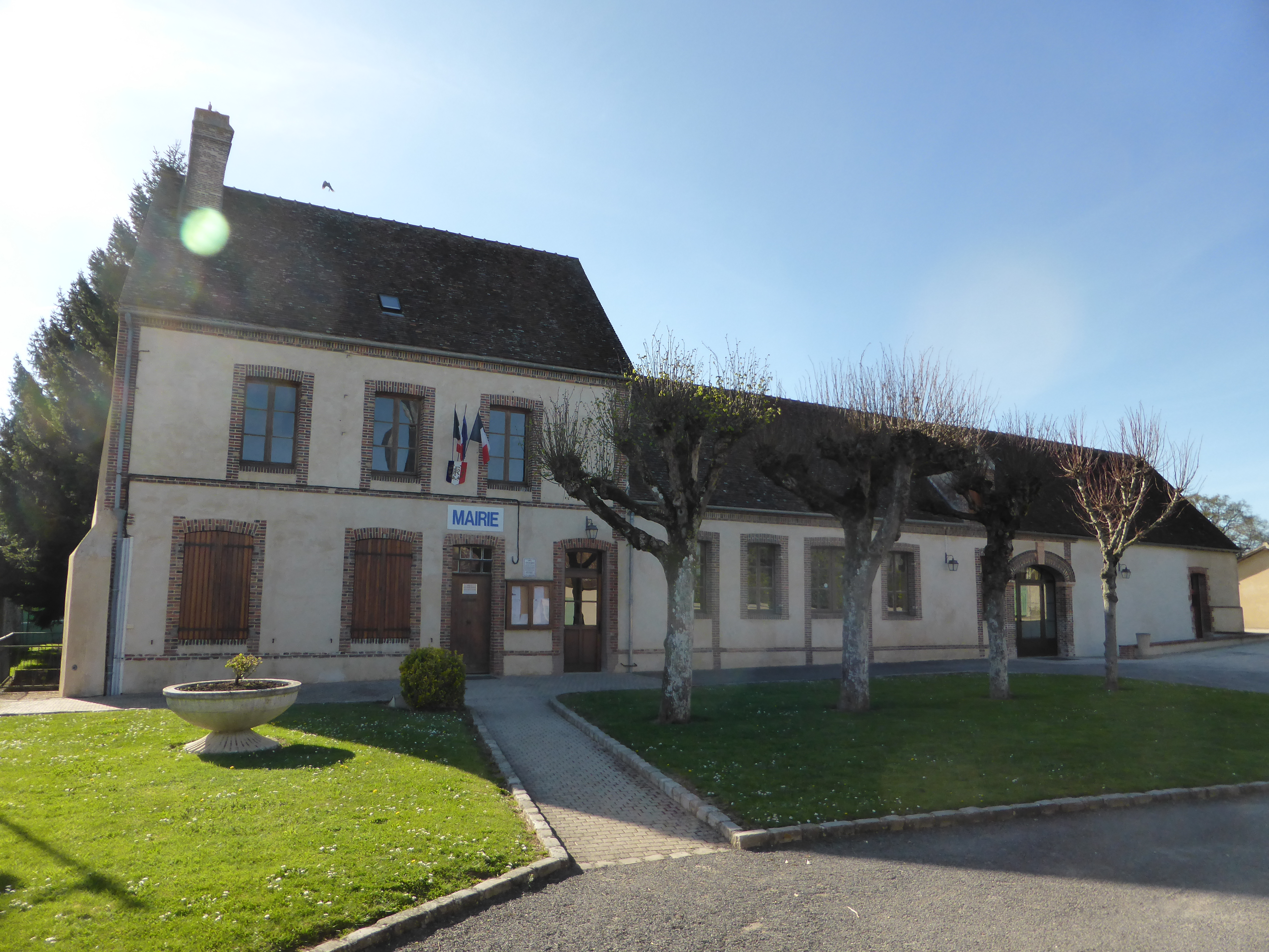 Mairie de Saint-Maixme-Hauterive, en Eure-et-Loir.